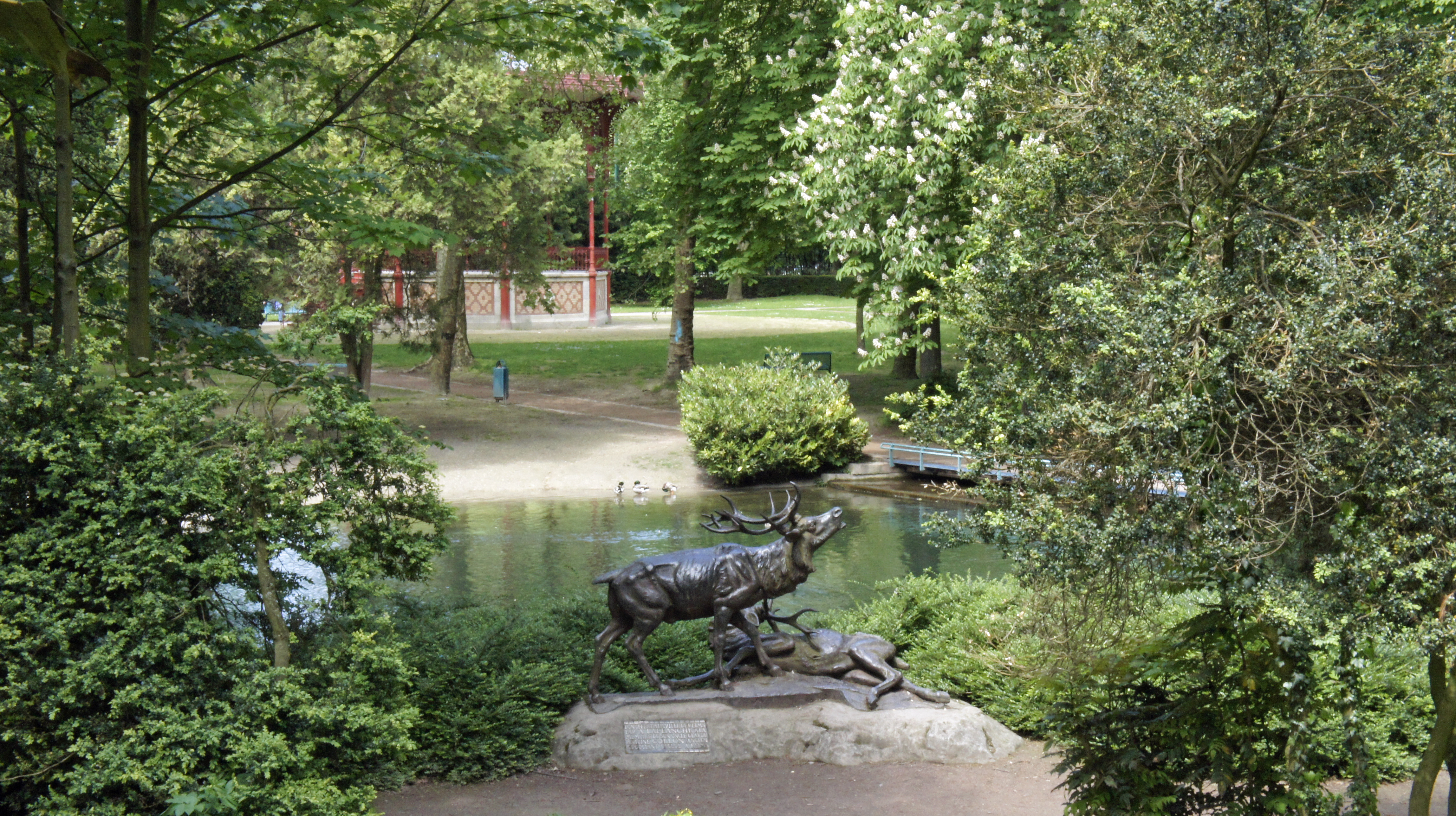 Une vue du kiosque à musique, de la mare et des cerfs.